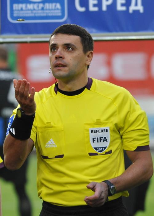 Анато́лій Бори́сович Абдула́ (народився 12 листопада 1976) — український футбольний арбітр